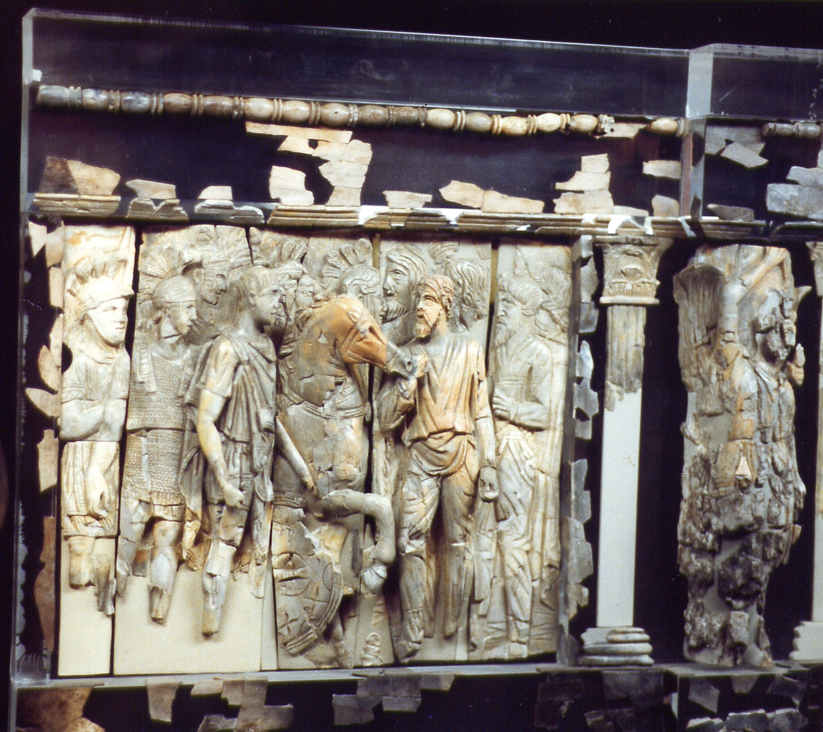 Teil eines Elfenbeinfrieses, Trajan im Kampf gegen die Parther, Ephesus-Museum Selçuk, Westtürkei